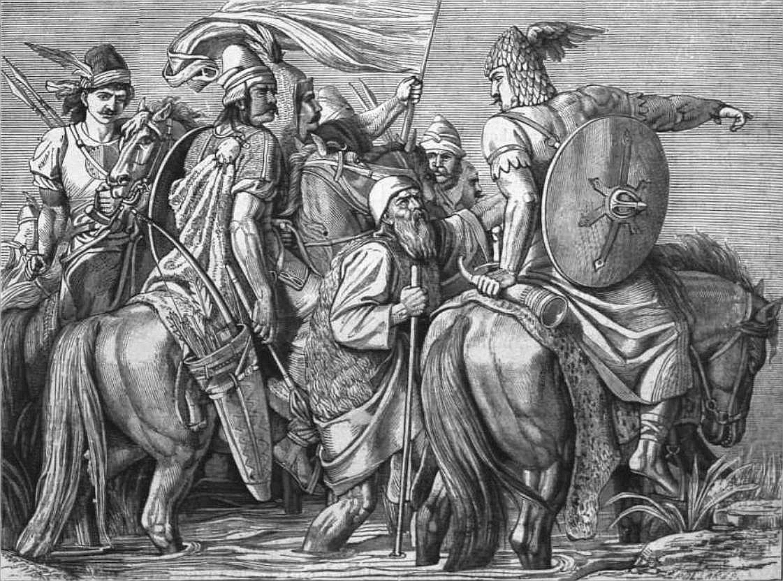 Lotz Károly A magyarok megérkezése az új hazába. A Vasárnapi Újság illusztrációja. A vigadói freskókat követően Than a Nemzeti Múzeum lépcsőháza díszítésekor még nagyobb feladat megoldására vállalkozott: a dualizmus első évtizedében (1868-1877) a magyar történelem kimagasló eseményeinek festésére. Feladatát kiválóan oldotta meg, s művében kifejezésre juttatta haladó gondolkodását. A freskók kisebb részét Lotz festette. De amint Than írta: "Lotz itt is antik tárgyat óhajtott, félvén attól, hogy a magyar kultúra történetéből nem lehet elég anyagot meríteni." Lotz a hunok Ázsiából való előretörésétől az ősmagyar mondakör és a honfoglalás eseményeit, Than Géza fejedelem korától 1849-ig festi a történelmet. Továbbá Lotz a mennyezet allegóriáit, Than a lépcsőház falának allegórikus alakjait festette meg. Pozitivista és romantikus történelemszemlélet keveredik a képsorban (A hunok kijövetele Ázsiából, A magyarok az őshazában hallgatják a táltos regéit Attila birodalmáról, A magyarok indulása az új hazába, A magyarok megérkezése az új hazába, Az ősök vérszerződése, Az alpári csata, Árpád a legyőzött fejedelmek hódolatát fogadja, Ősmagyarok áldozása, A kereszténység első hirdetése), melyben az életképszerűtől a csataképig és művelődéstörténeti képig különböző kompozíciós típusok tanulságait használta fel a festő.